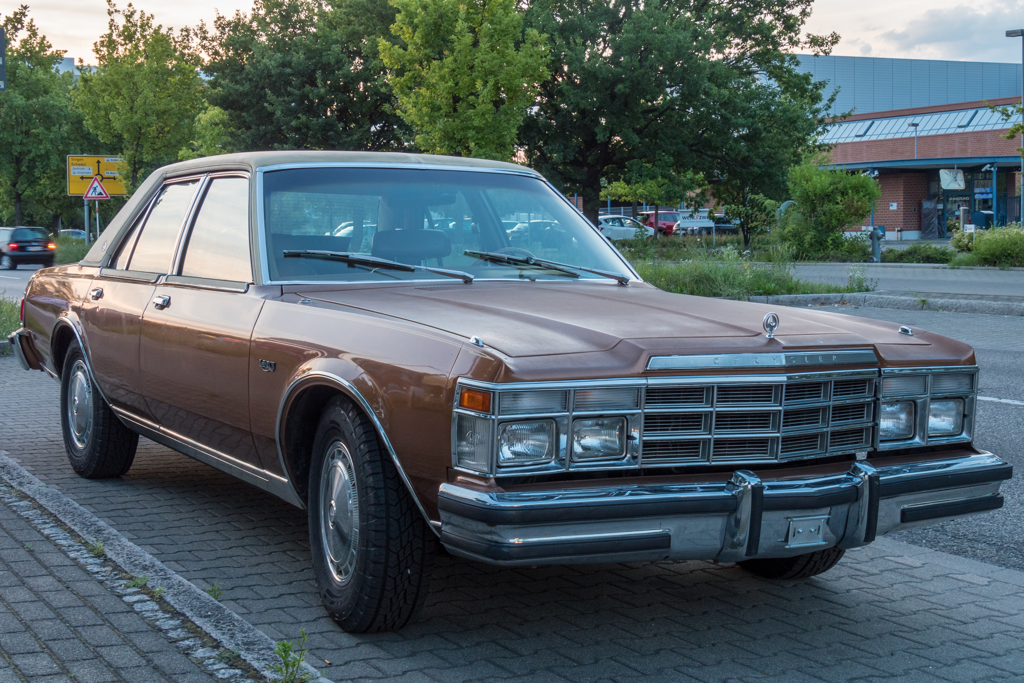 Chrysler LeBaron Sedan aus der 2. Hälfte der 70er Jahre